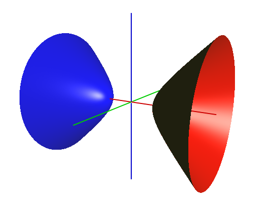 Dvojdílný rotační hyperboloid.